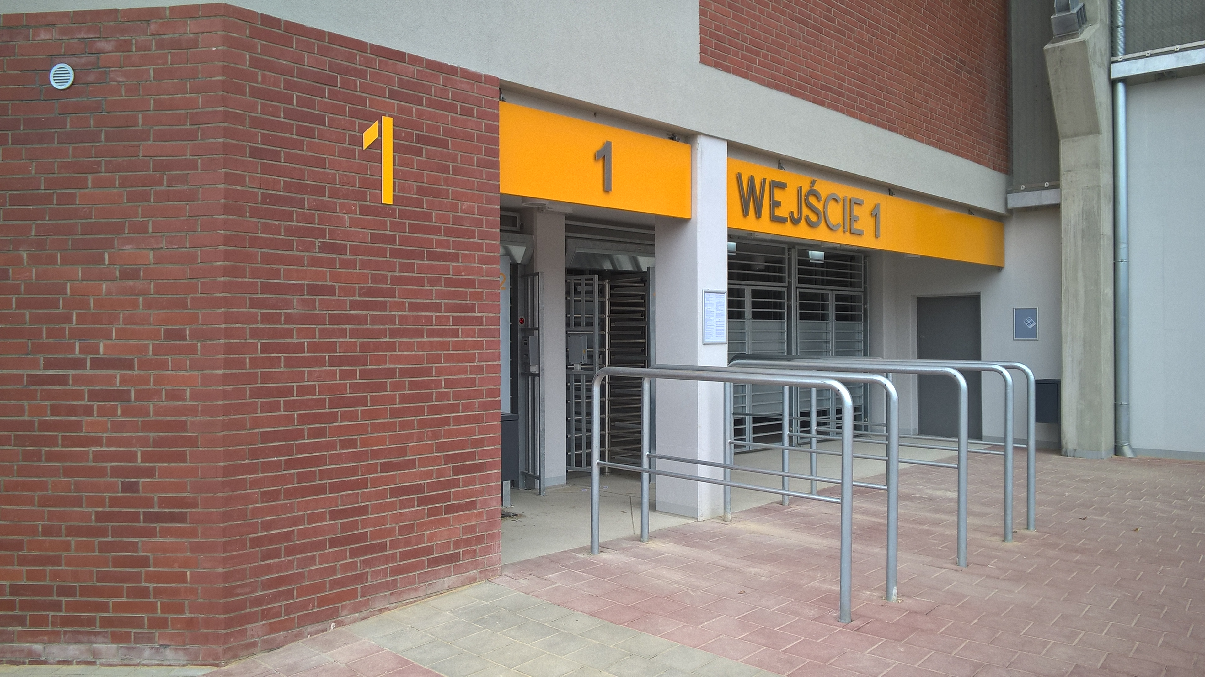 Nowy stadion Widzewa - wejście nr 1 (marzec 2017)